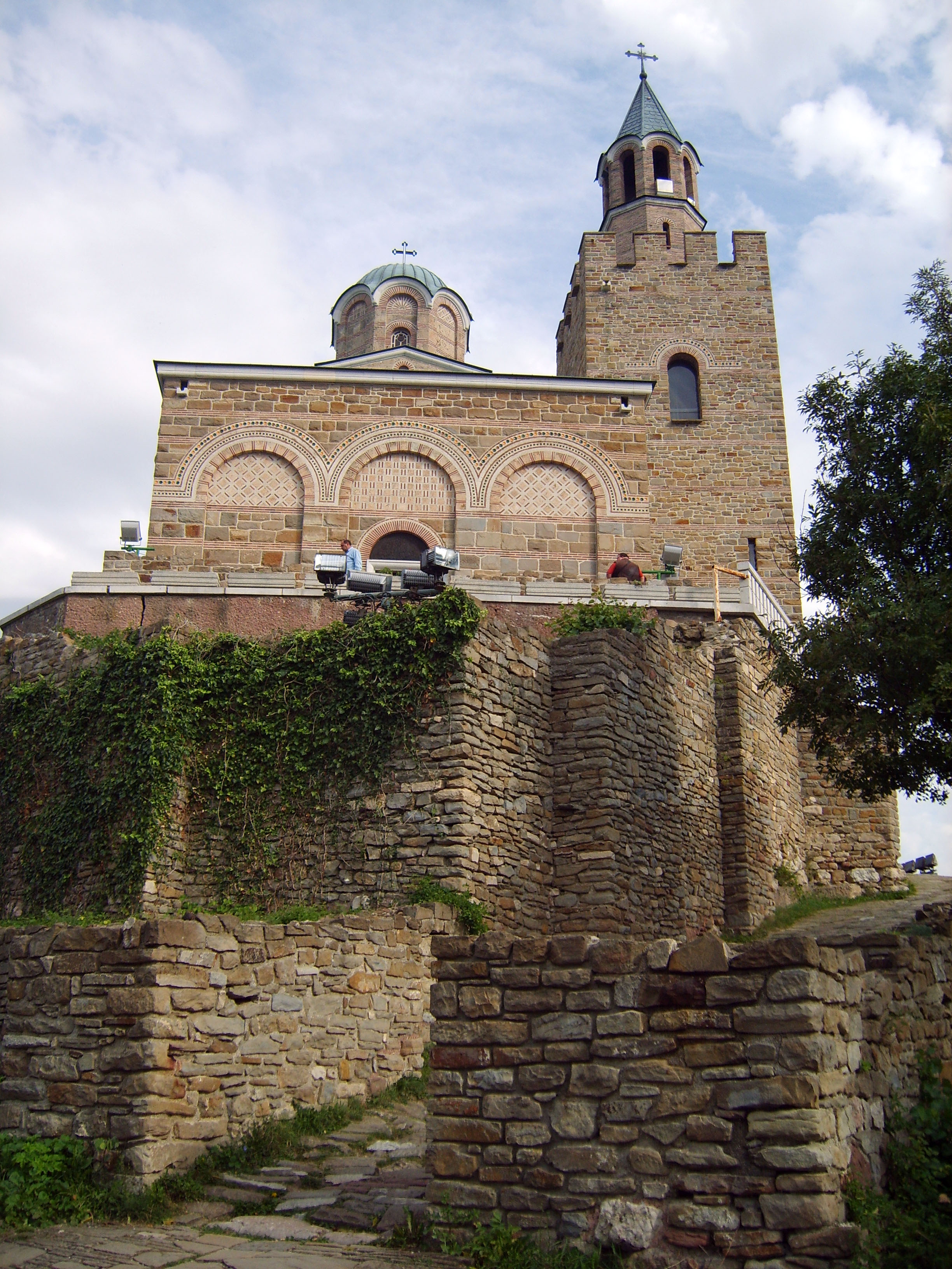 Patriarshia, Tarnovo, Bulgaria